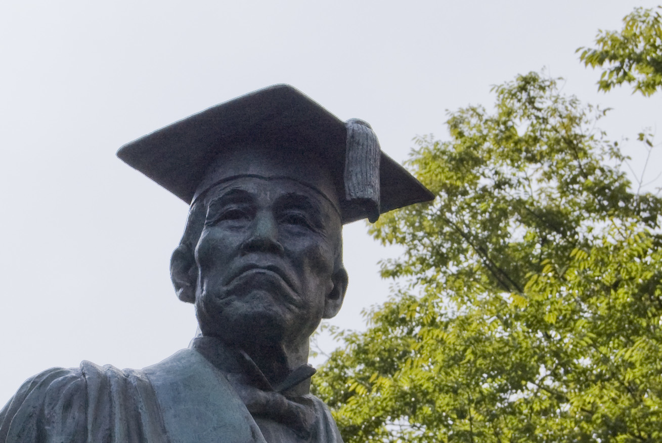 Okuma, Gründer der Waseda-Universität